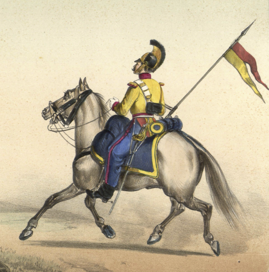 Lancero del regimiento de caballería de línea n.º 7 «León», según el reglamento de 1843